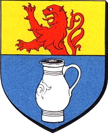 Blason de la commune de Betschdorf, réalisé à partir de celui l'ancienne municipalité Oberbetschdorf